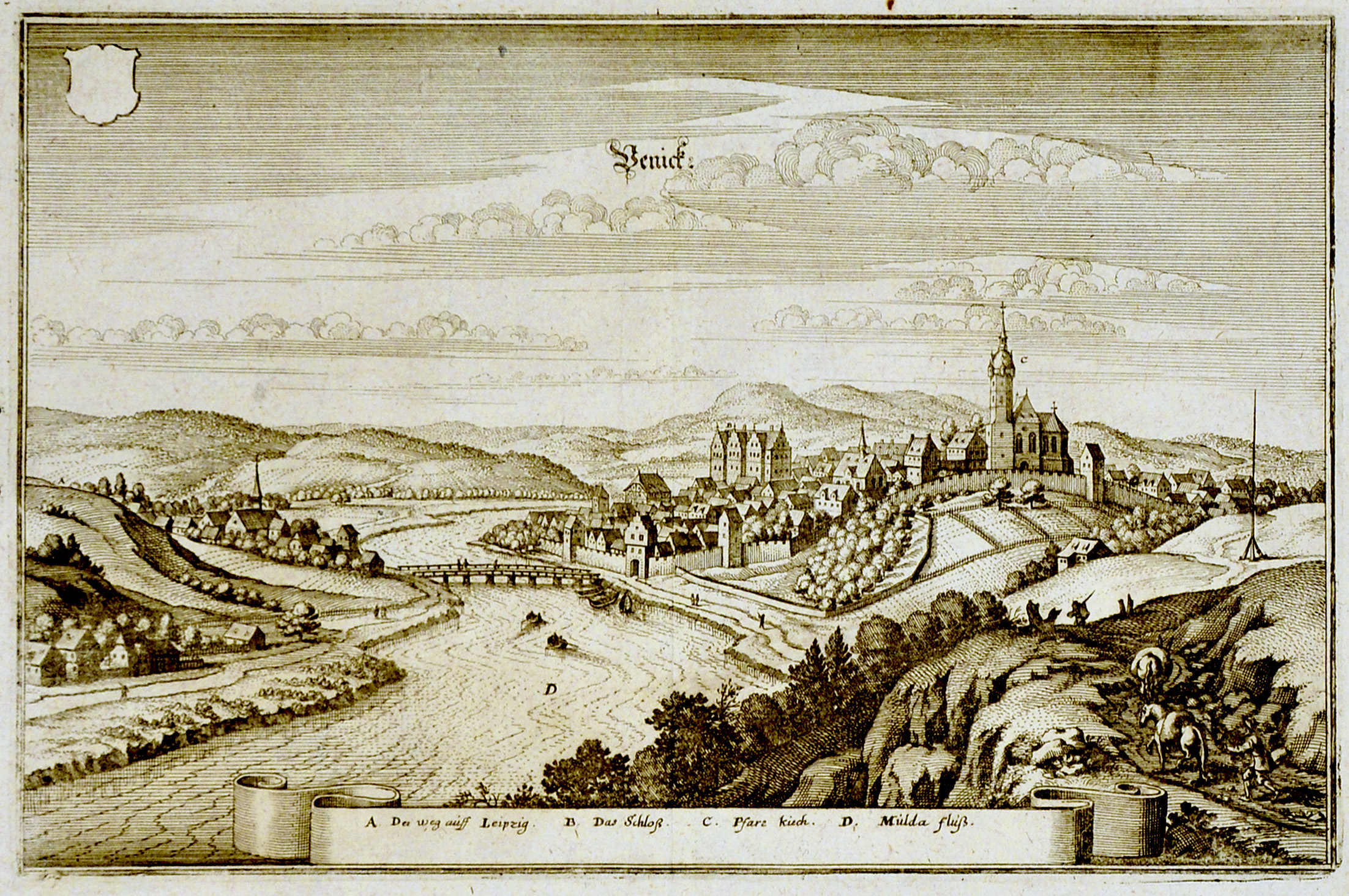 Penig um 1650. Kupferstich 20,5 x 31,5 cm von Merian d. Ä.